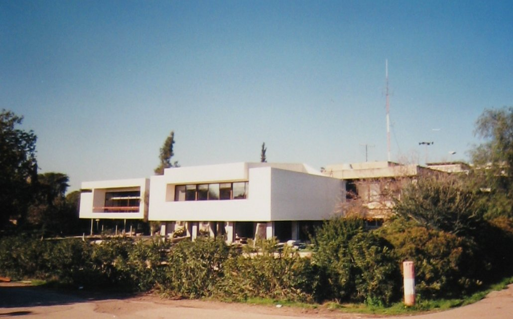 Dining room van Kfar Hanasi